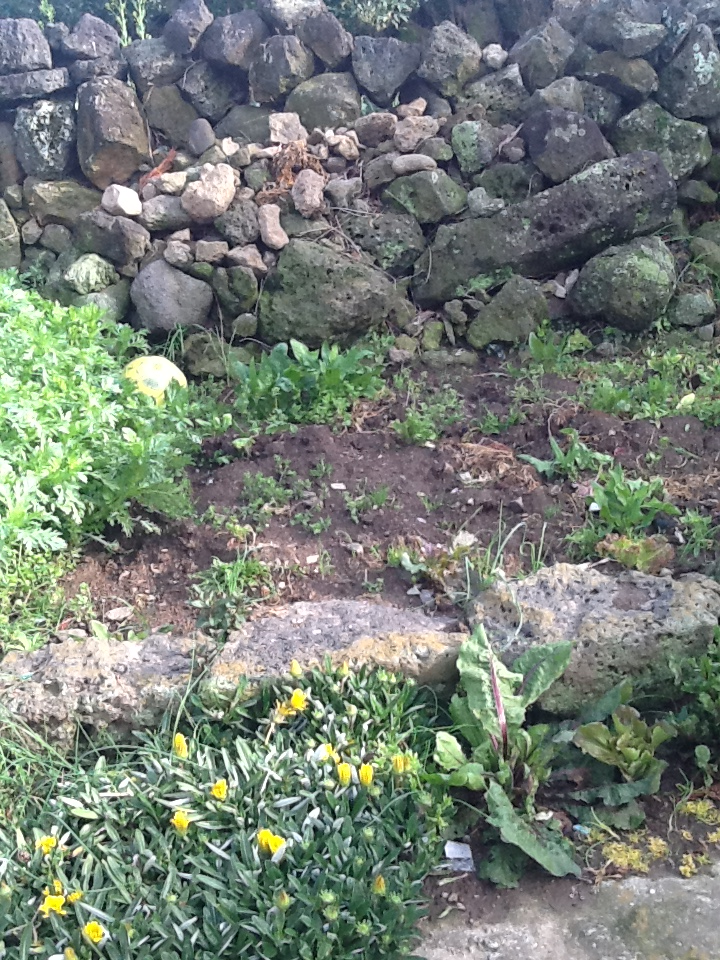 텃밭 사진